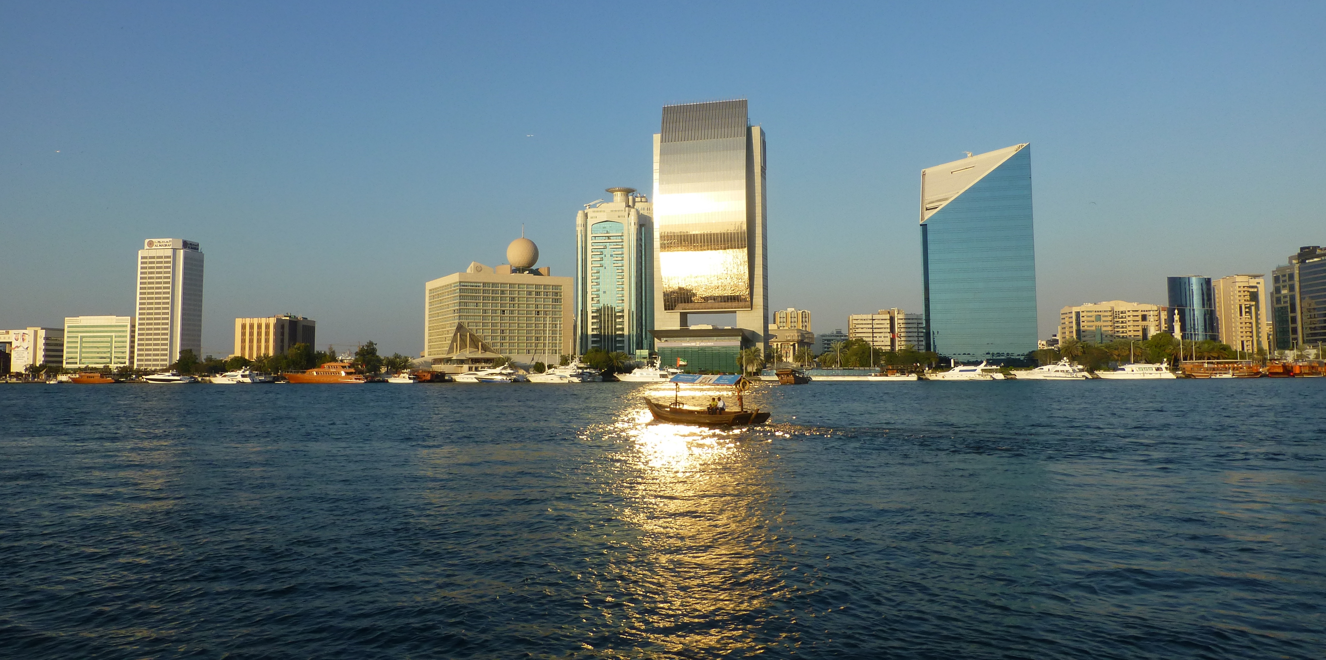 Dubai – Creek - جدول